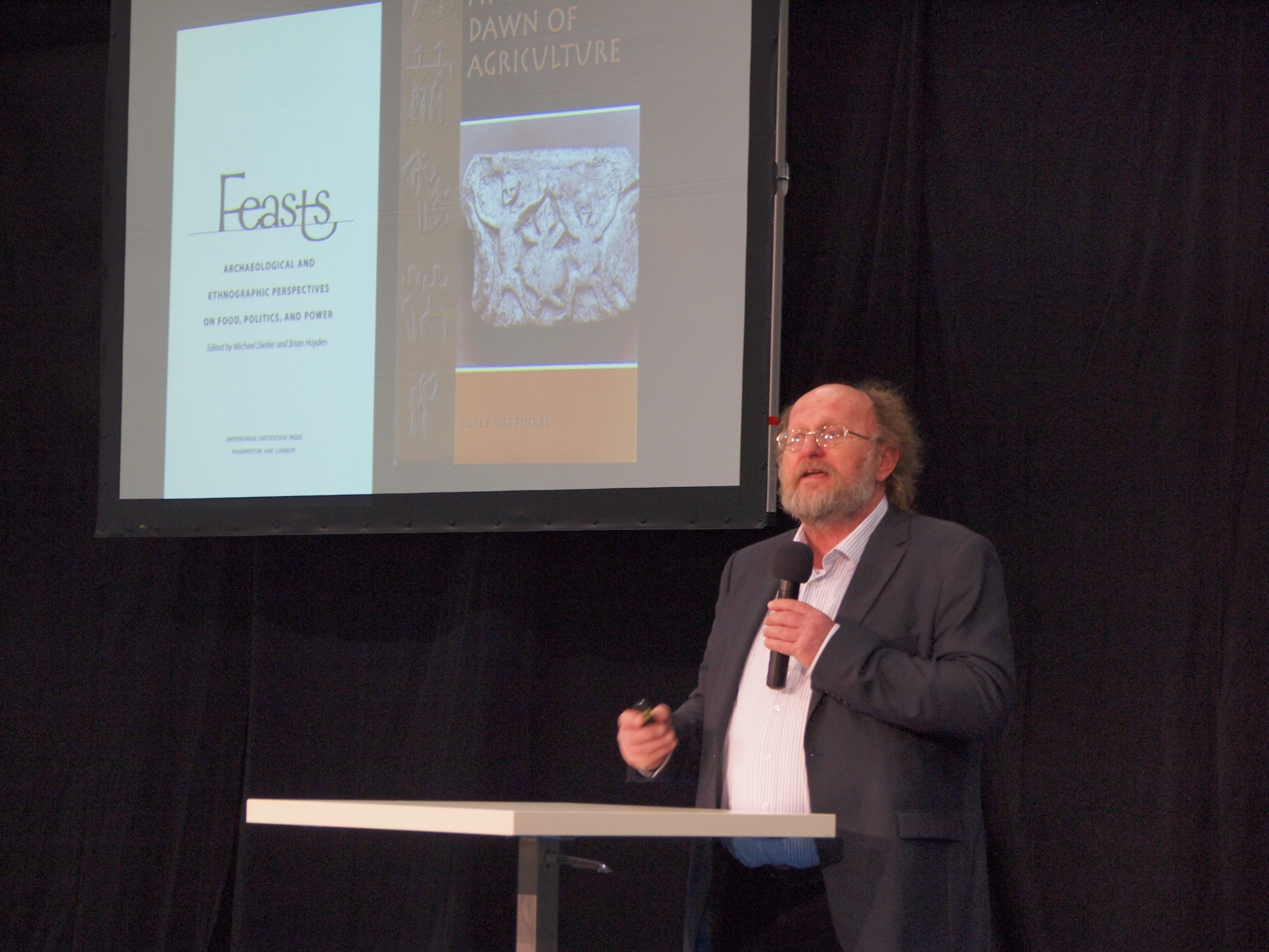 Dr. Klaus Schmidt (ARGE Archäologie) auf der Monumento 2014 Personality rights warningAlthough this work is freely licensed or in the public domain, the person(s) shown may have rights that legally restrict certain re-uses unless those depicted consent to such uses. In these cases, a model release or other evidence of consent could protect you from infringement claims.